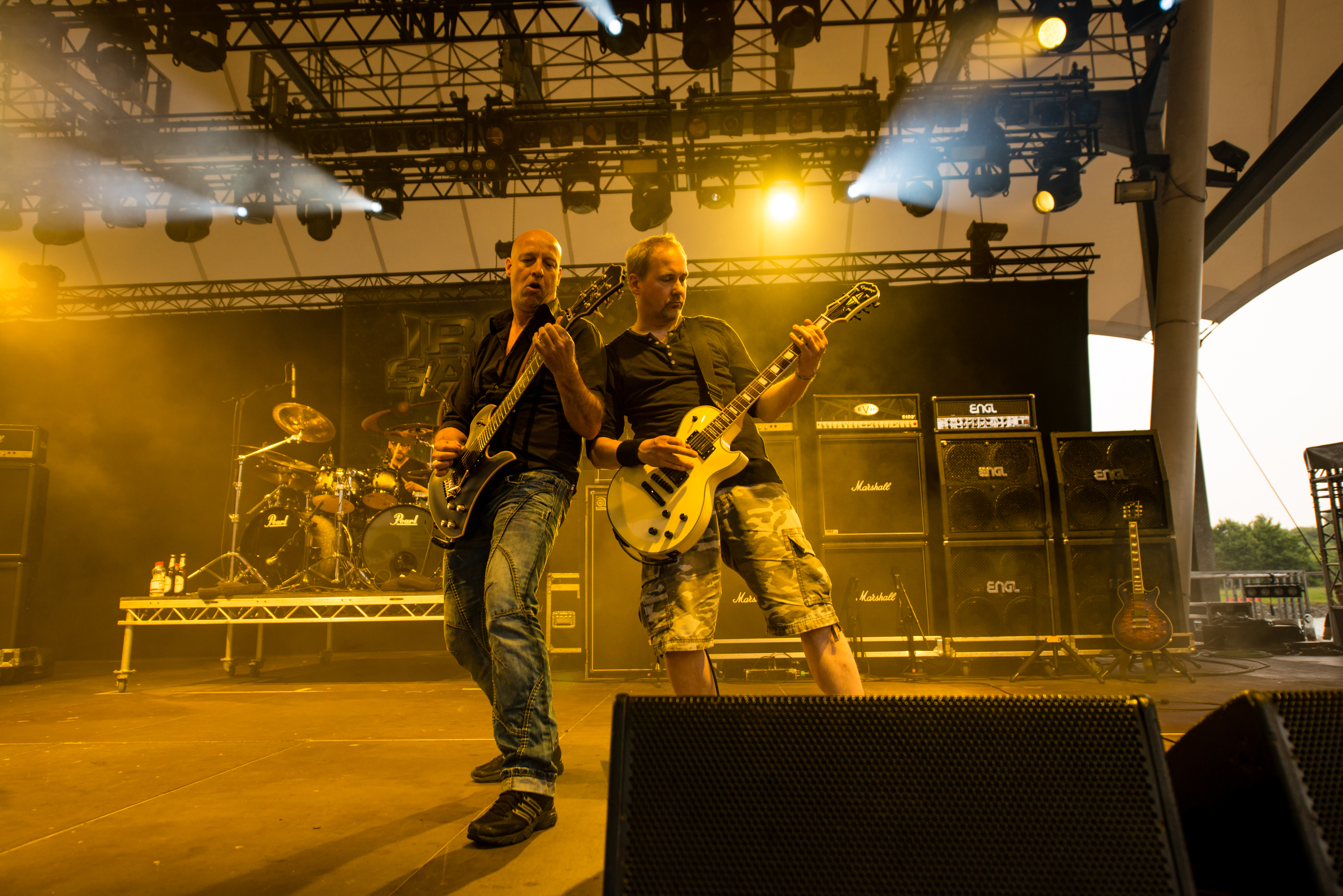 'Rock Hard Festival 2014 - Gelsenkirchen': 'Iron Savior'